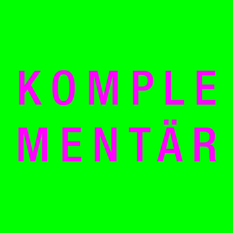 Darstellung von den Komplementärfarben mit Schrift in Magenta auf Grün.